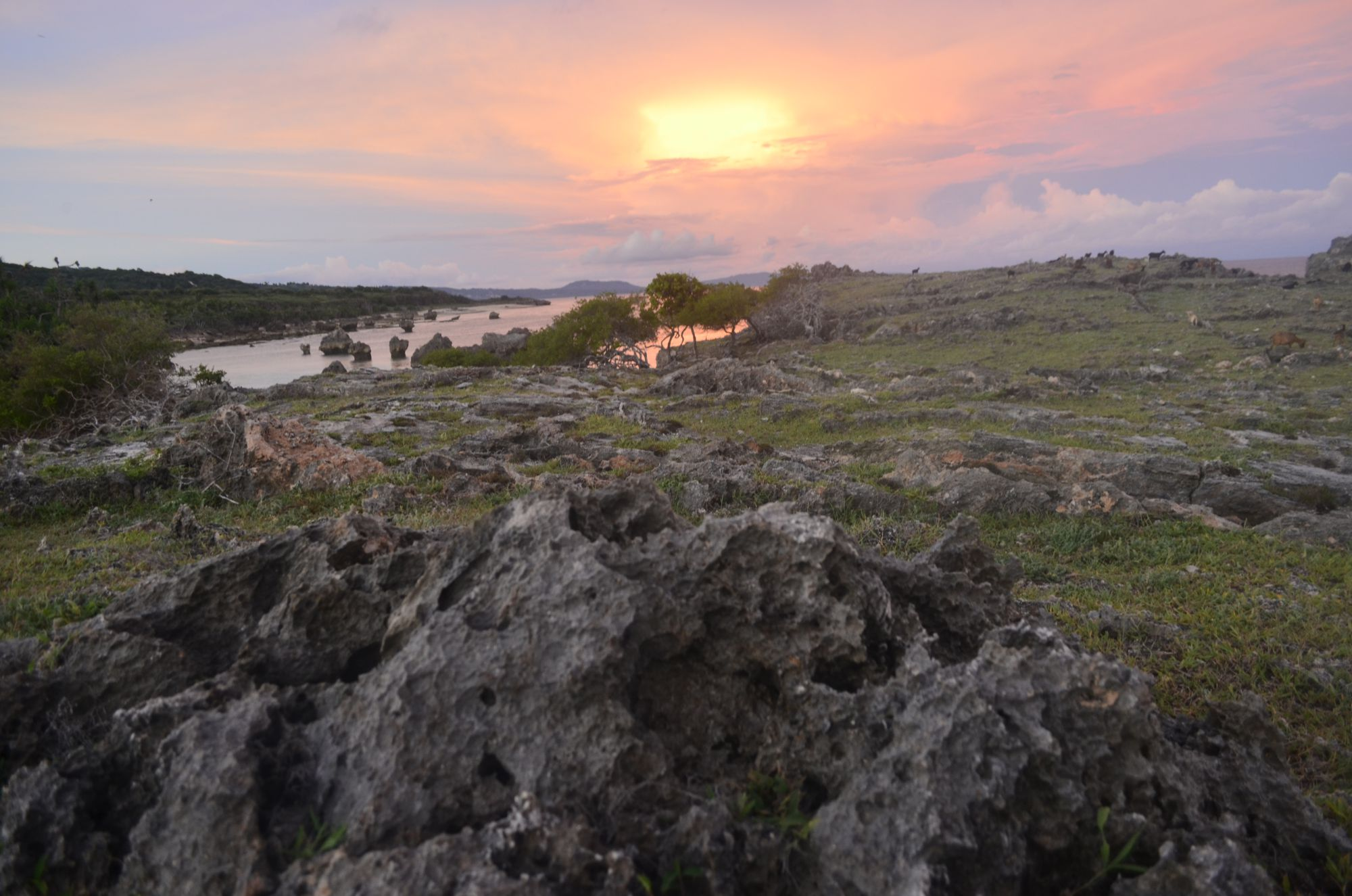 Senja di Pulau Rote, Titik Nol Bagian Selatan Indonesia